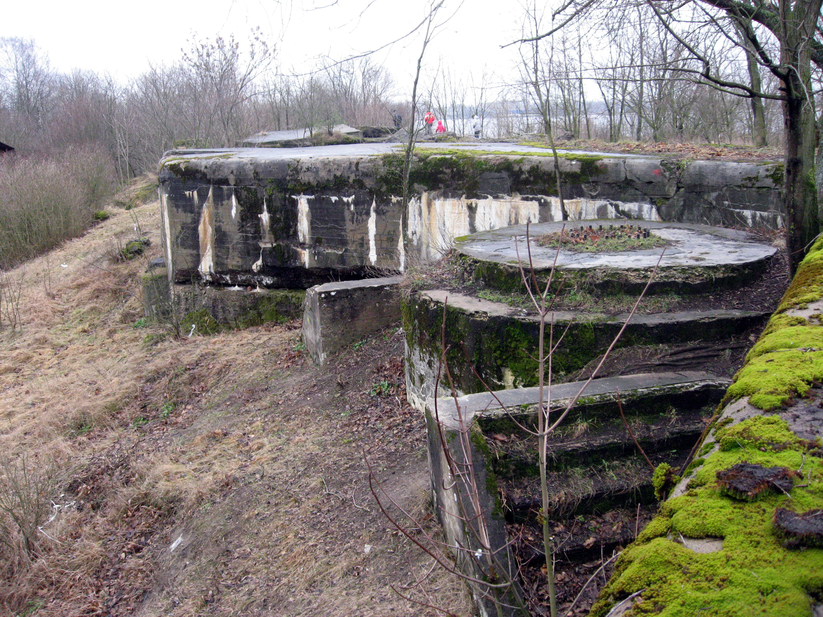 Mangaļu pussala, pevnost